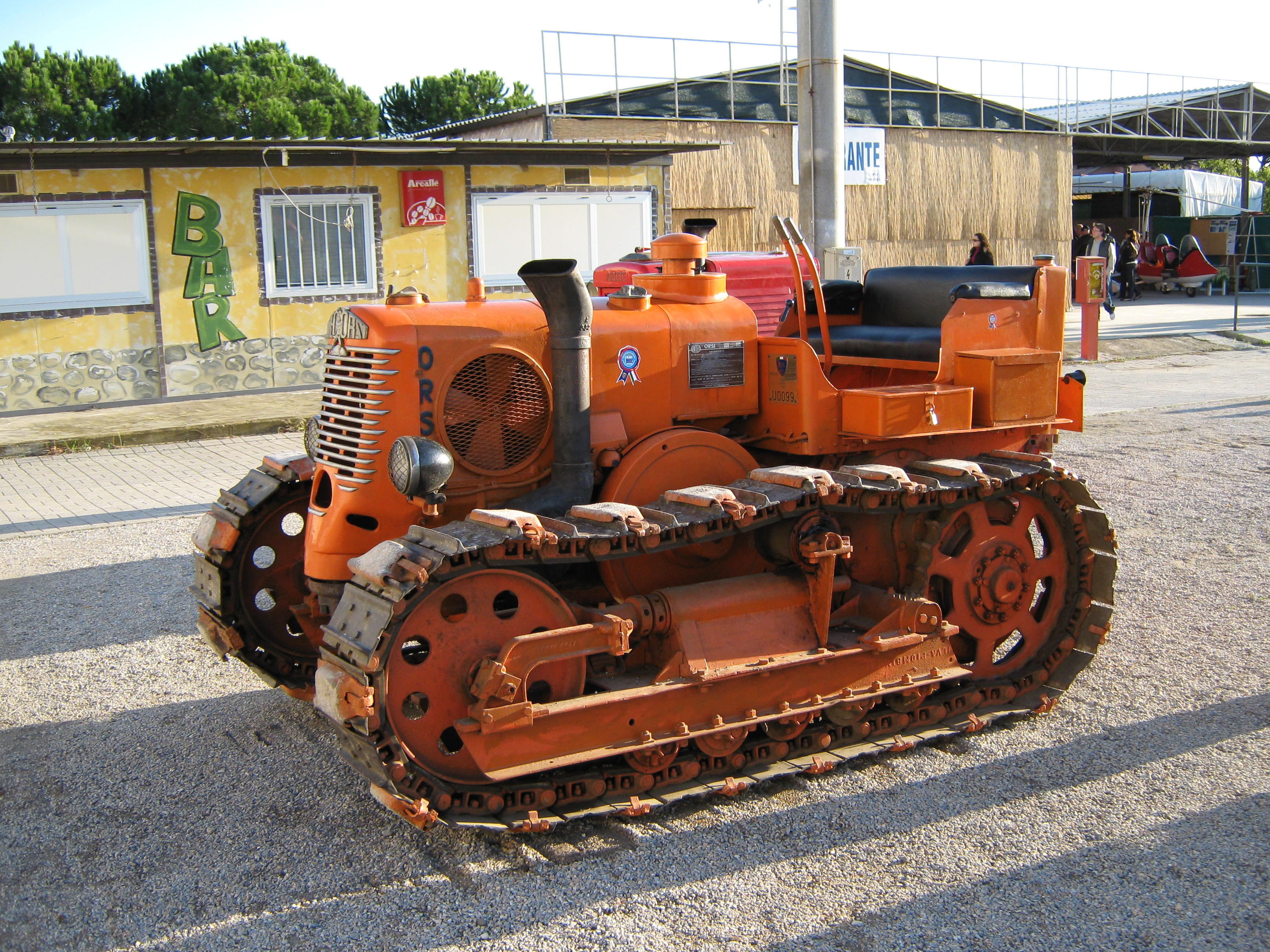 Trattore cingolato Orsi Anteo a testa calda del 1957, esposto all'Expo Model di Venturina (Provincia di Livorno) nel 2008. Realizzato sulla base del modello "Argo", con 60 CV di potenza, fu prodotto in 112 unità.